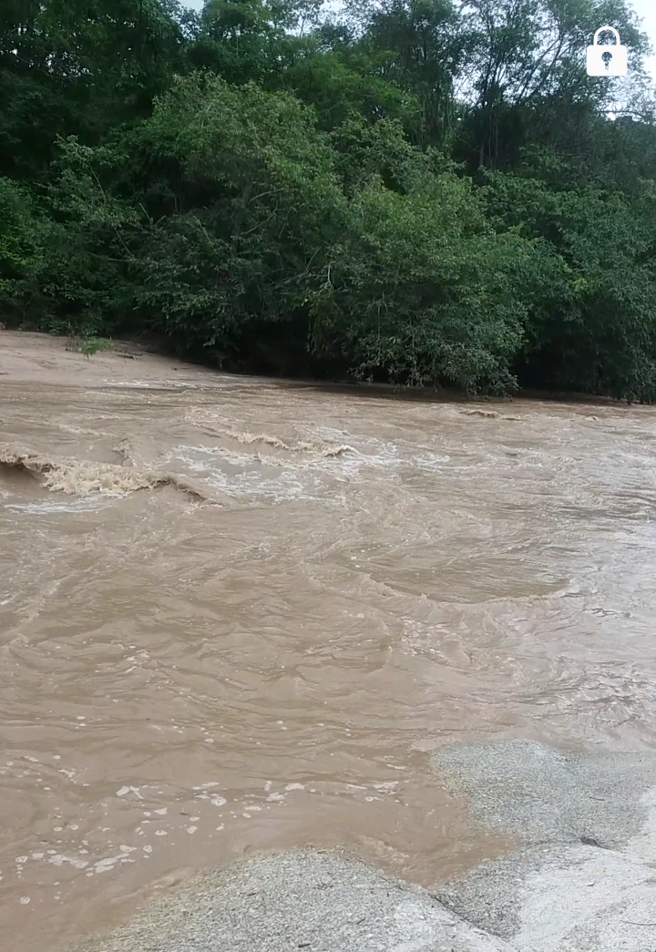 Rio Itinga na altura de Santa Cruz de Salinas, Minas Gerais.